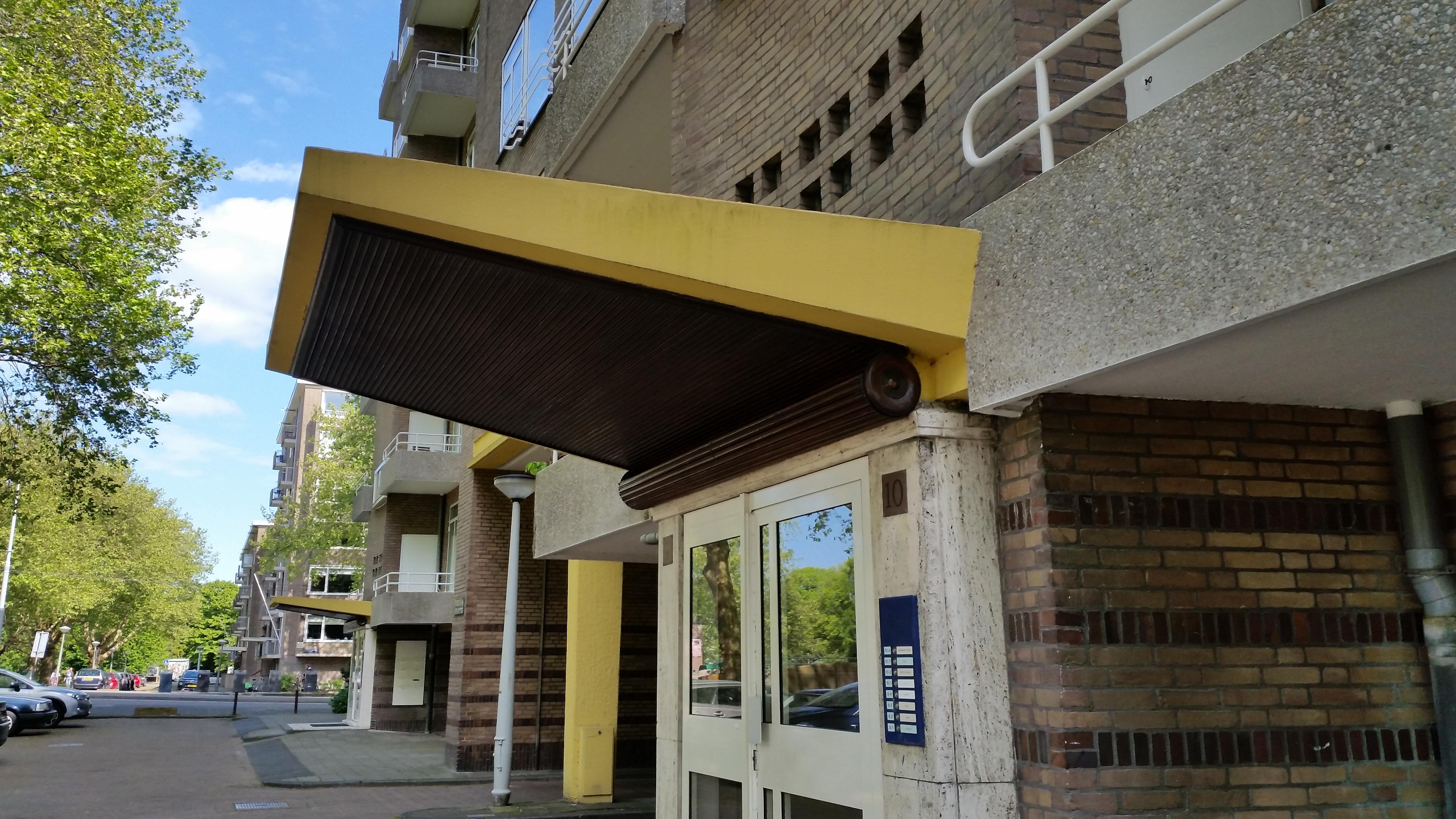 Gele luifel met daaronder houtbewerking van Cornelis Dopperkade 7-12, Amsterdam